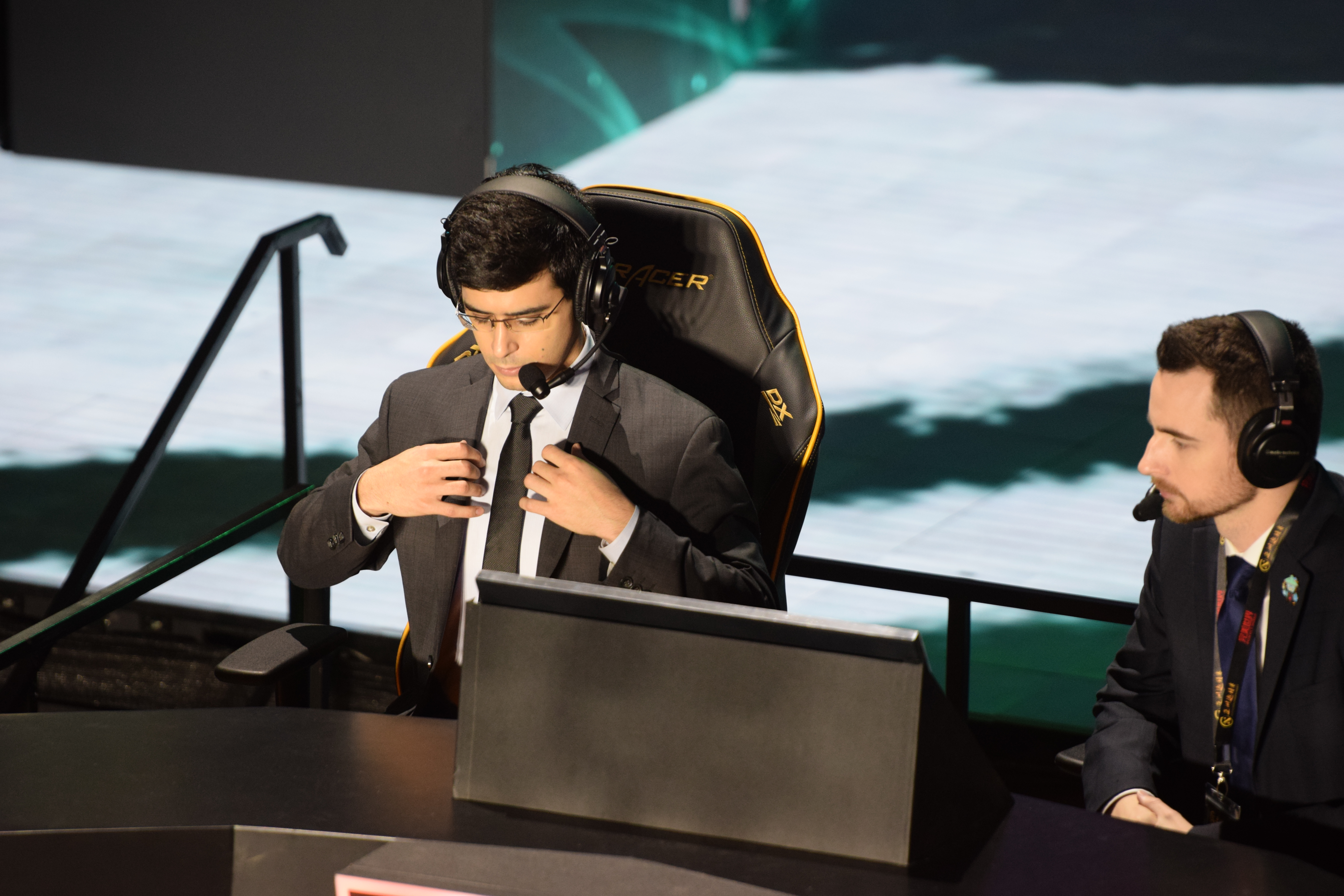 Fogged and KotLGuy